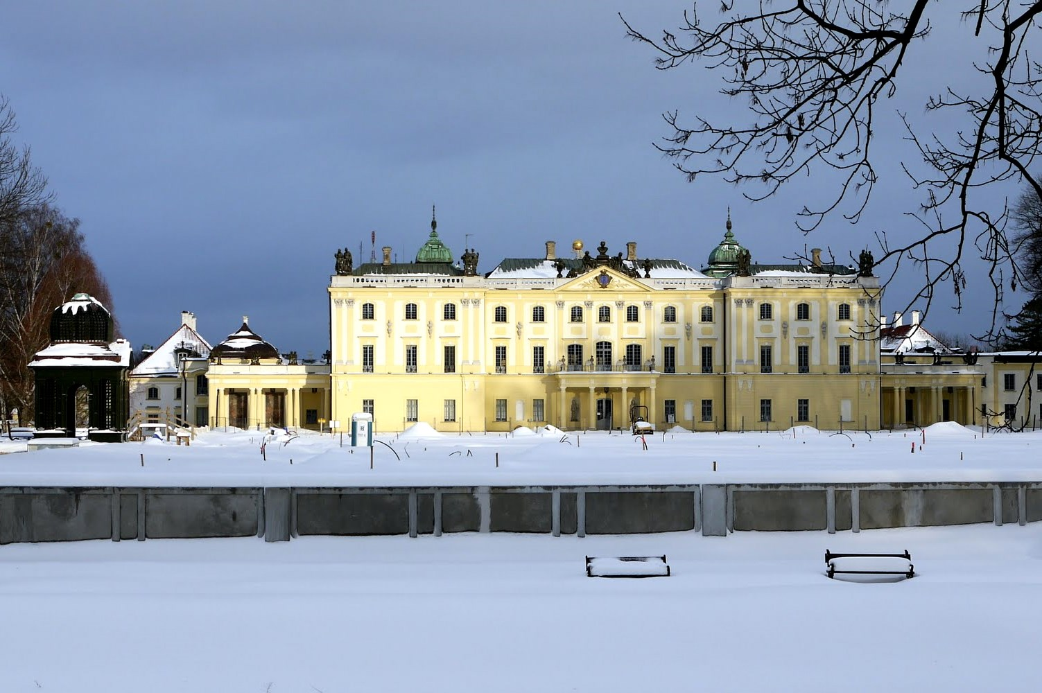 vue du sud, en hiver